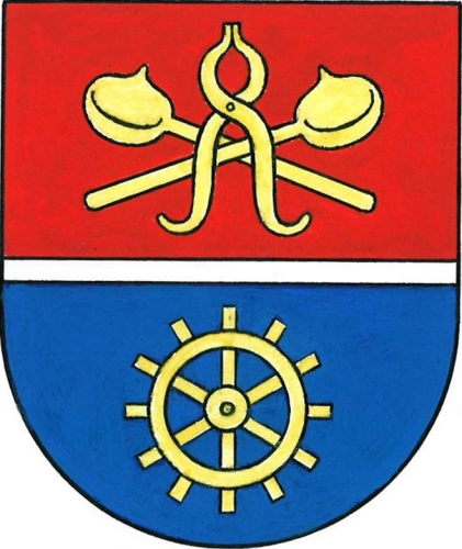 znak, Stará Huť, okres Příbram